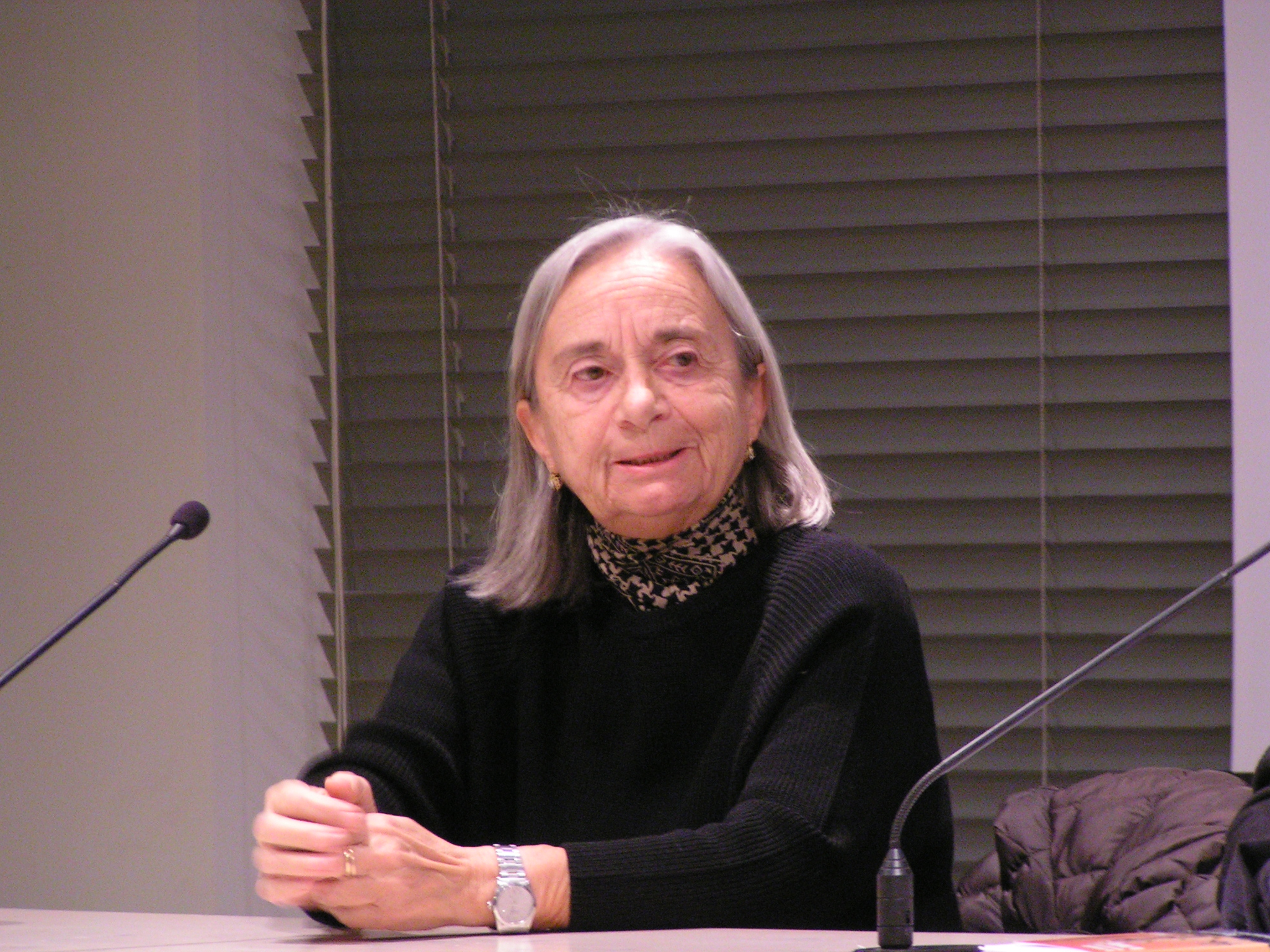 La regista Angela Ricci Lucchi, che insieme a Yervant Gianikian ha realizzato il documentario "Oh, uomo!", ultima parte della “trilogia della guerra” proiettata il 2 dicembre nel corso del seminario Redattore Sociale